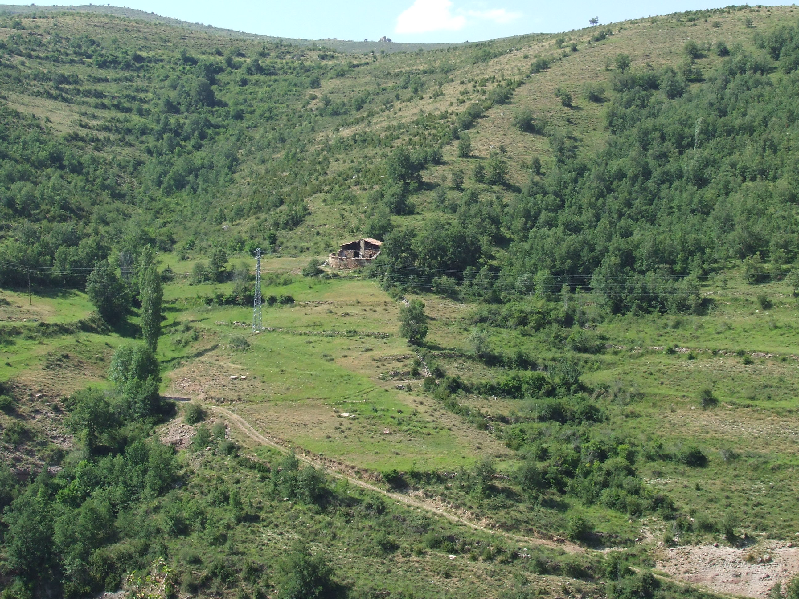 La Borda de Mateu (Xerallo, Sarroca de Bellera, Pallars Jussà)